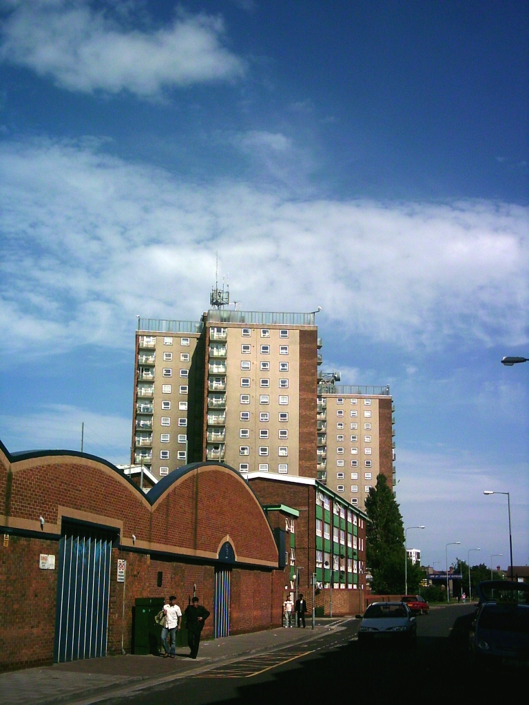 grimsby flats